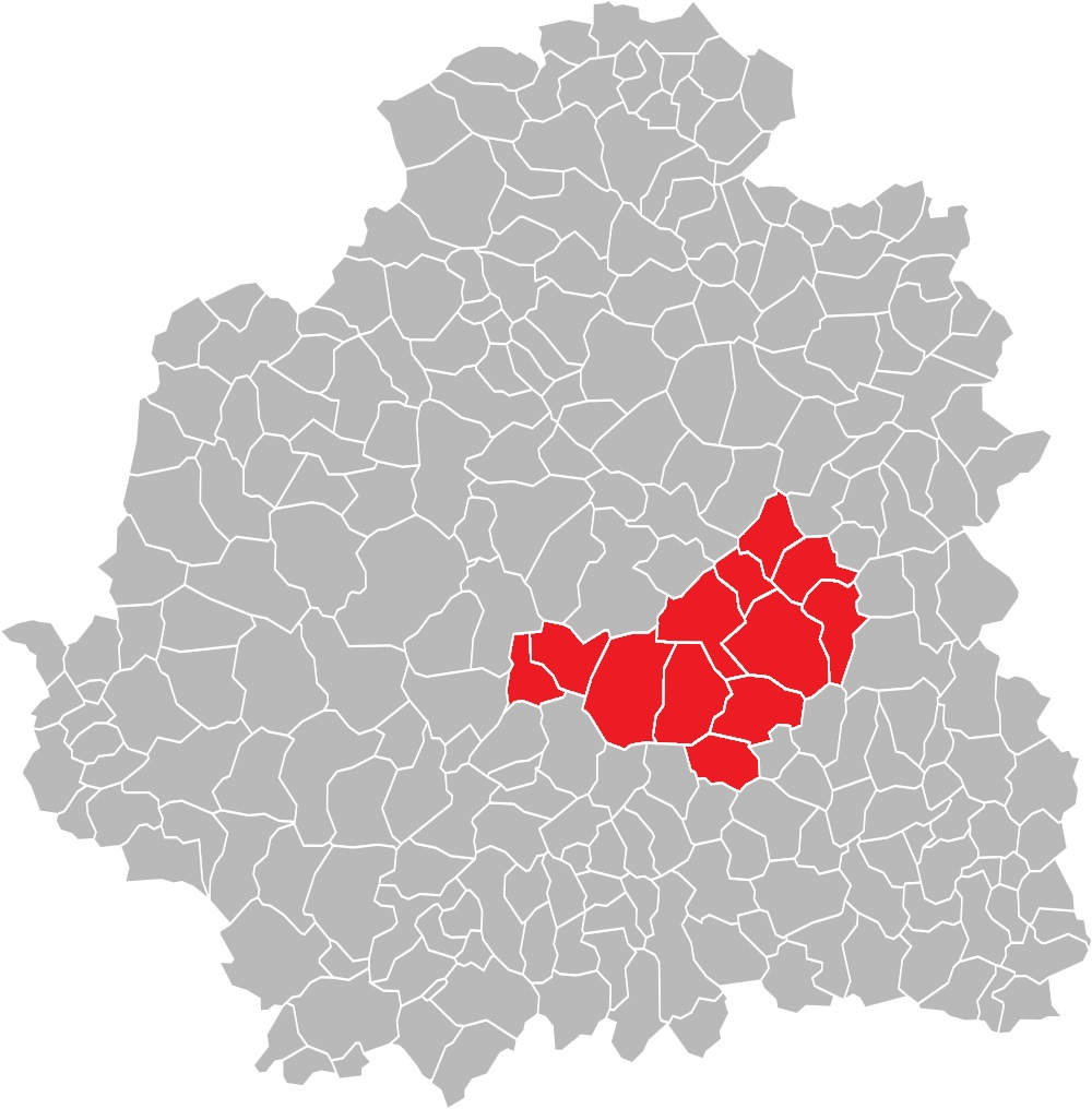 Carte des communes de l'Indre (36) : Le canton d'Ardentes, de 1790 à 2015.